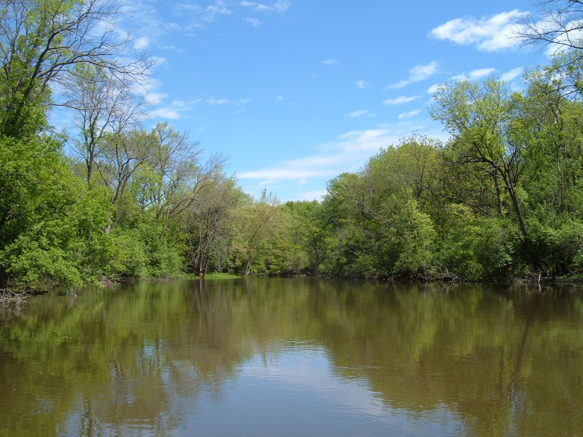 Des Plaines River, Illinois